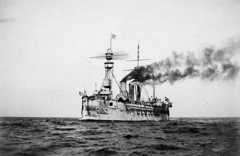 König Wilhelm auf Wacht